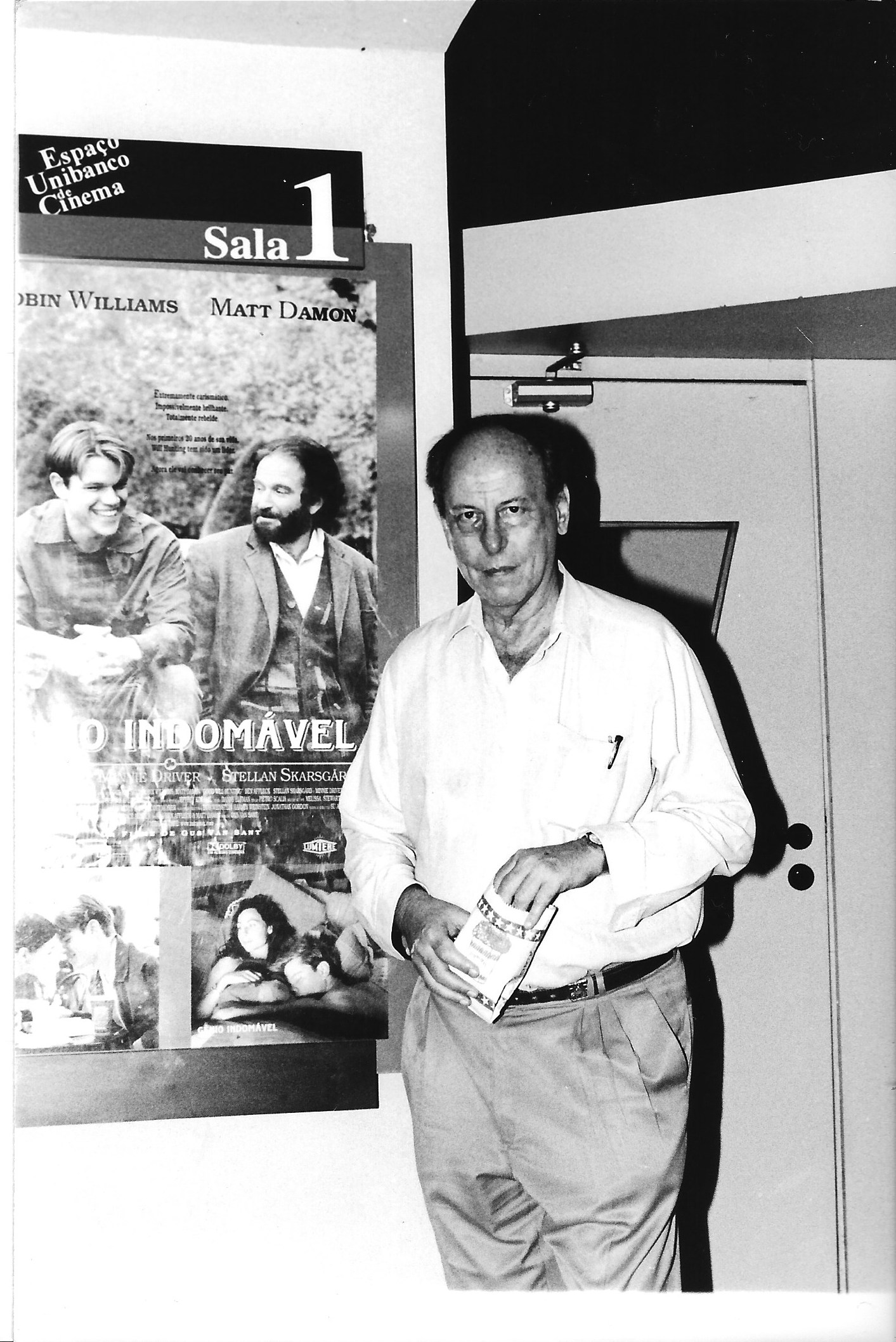 Fotógrafo:Lilian Zidan